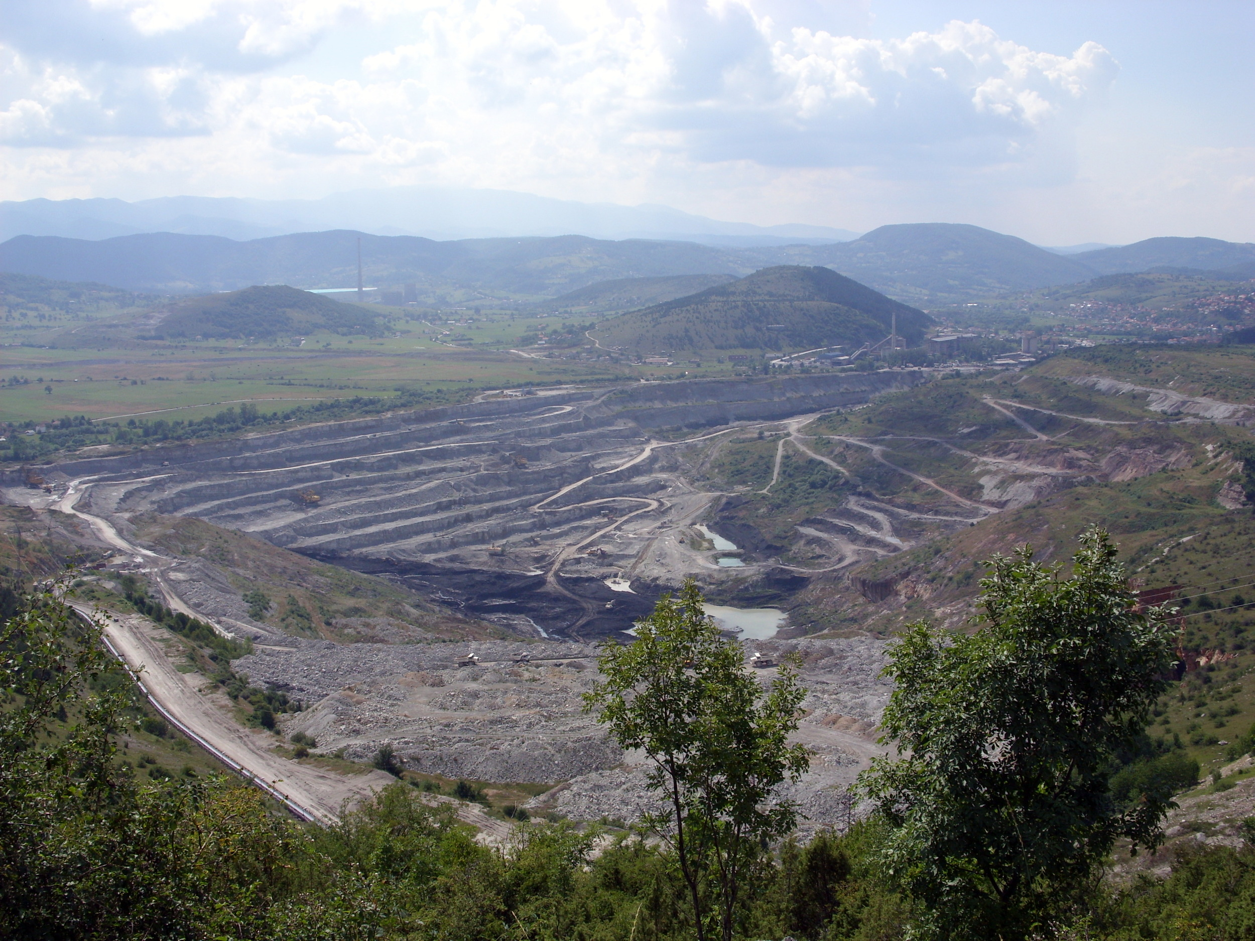 Braunkohletagebau bei Pljevlja im Norden Montenegros.